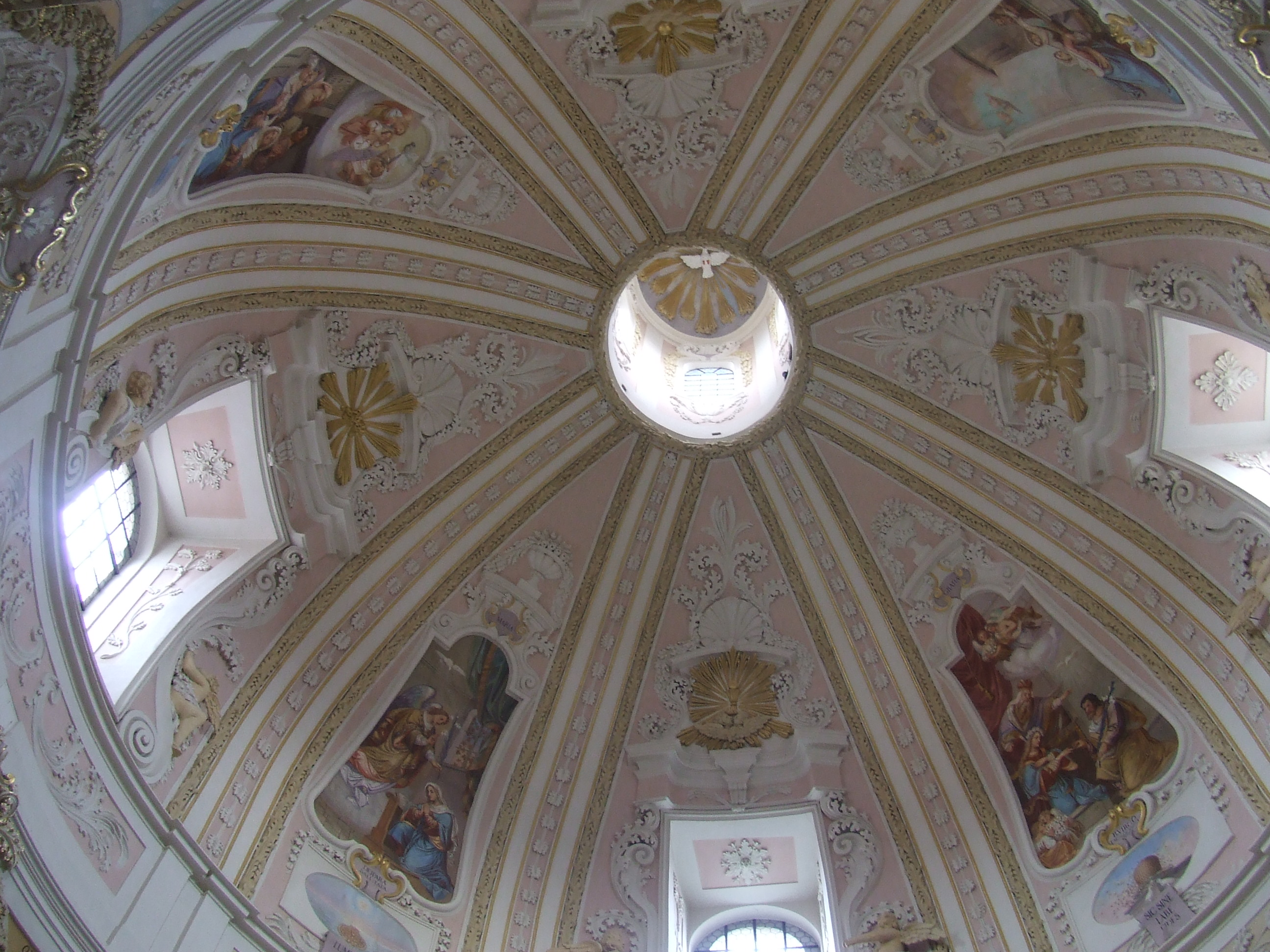 Wallfahrtskirche Maria-Hilf, Freystadt (Oberpfalz), Kuppel von Innen